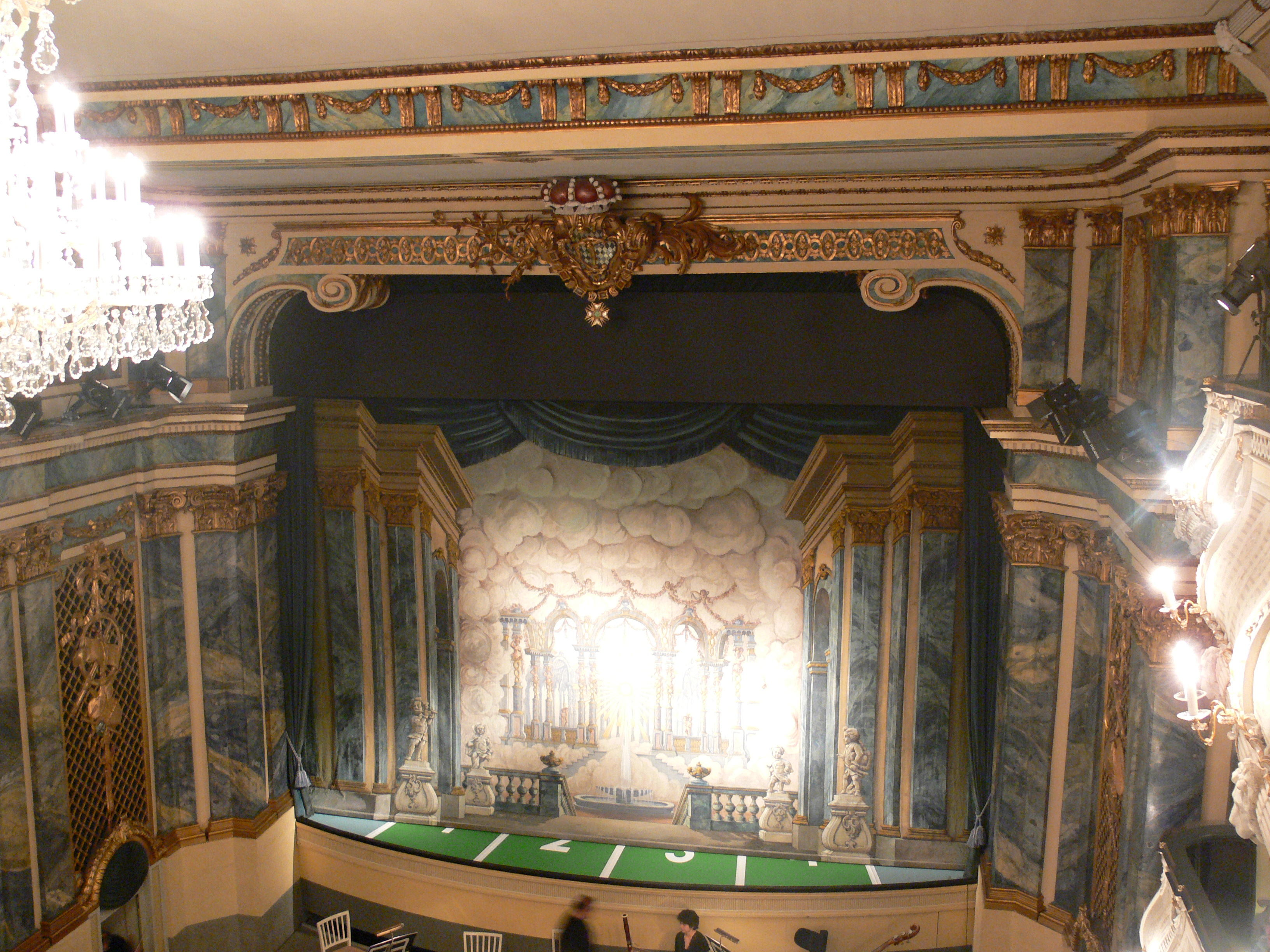 Schlosstheater Schwetzingen (so genanntes „Rokokotheater“) Blick zur Bühne